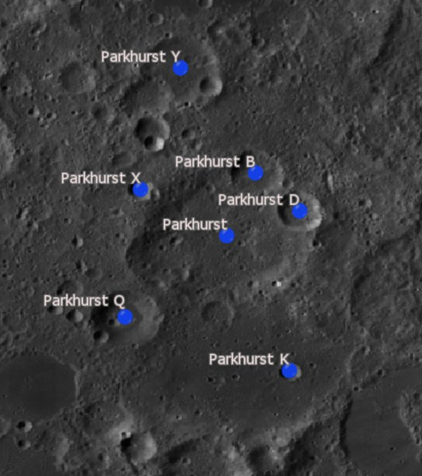 Cráter lunar Parkhurst. Cráteres satélite. (Imagen LRO)